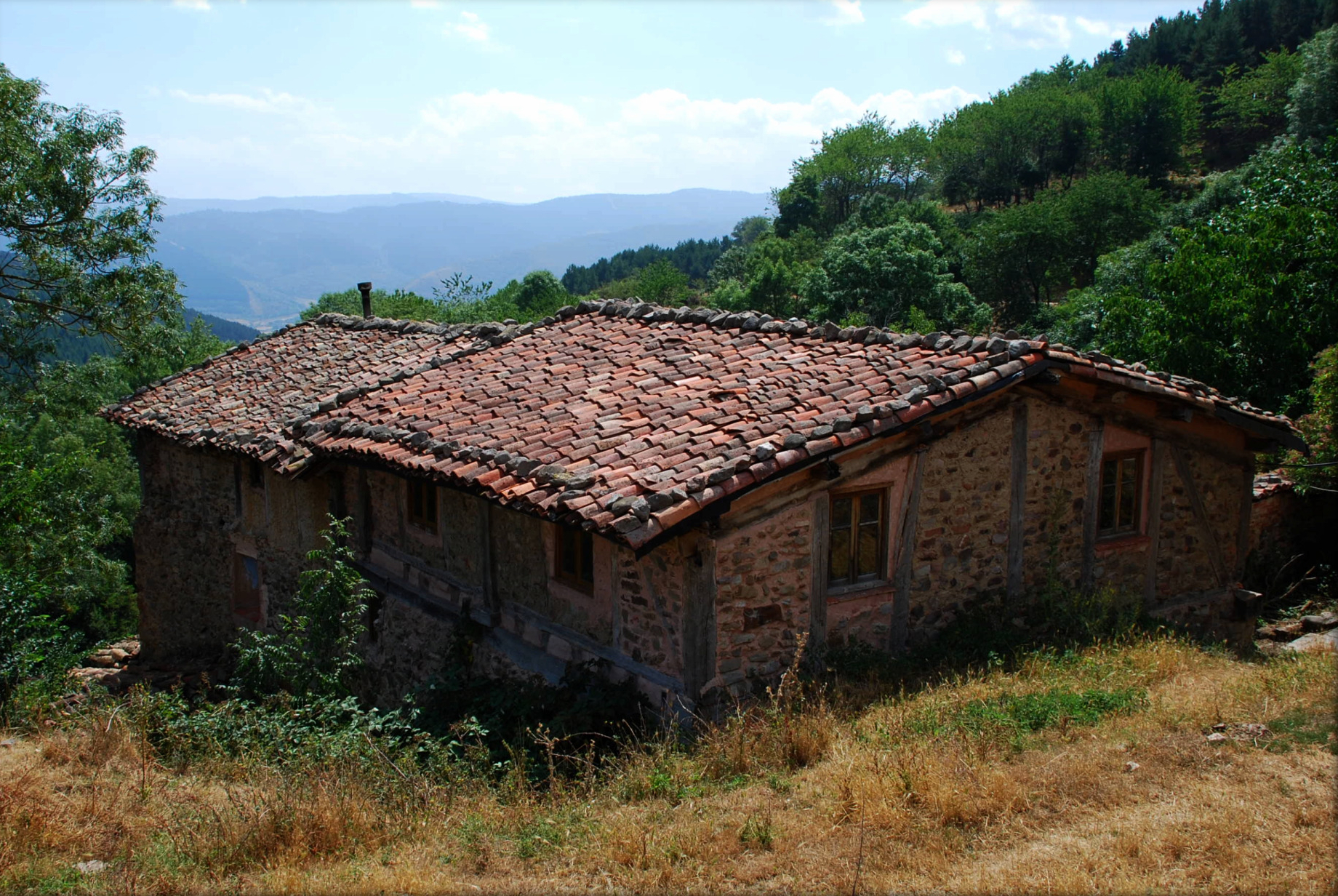 Tondeluna, aldea de Ojacastro en La Rioja (España).